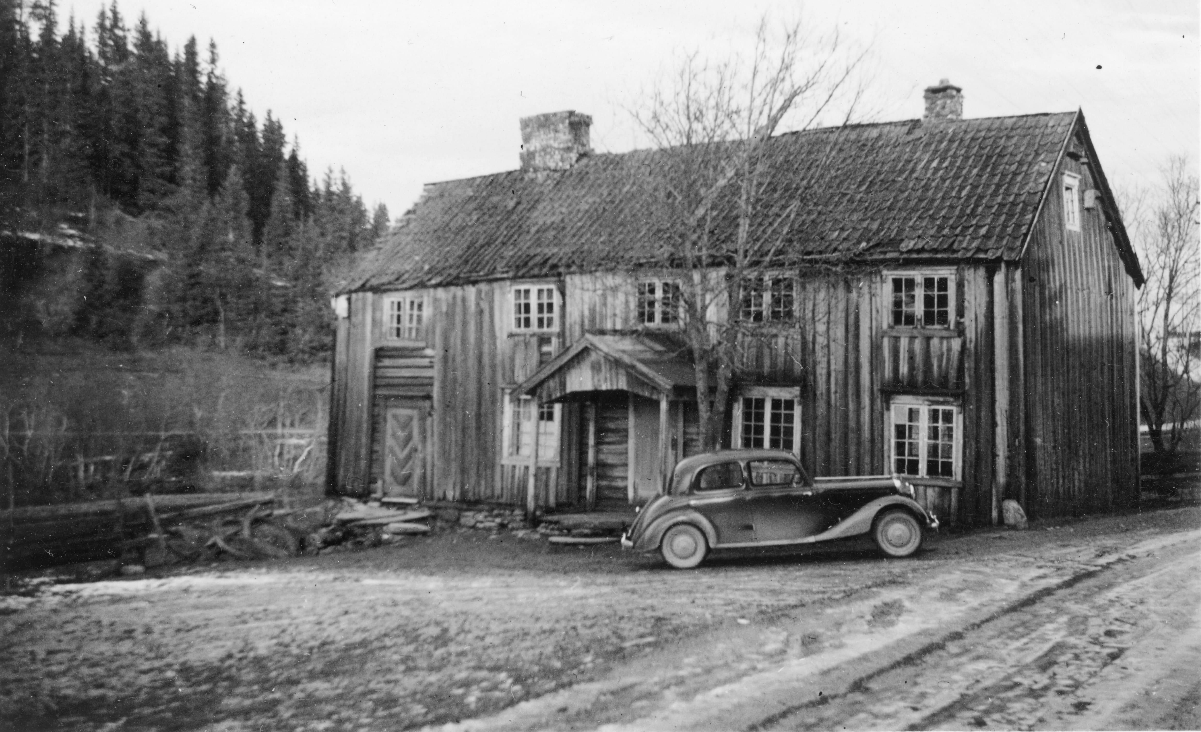 Leirbrua, Byåsen, eksteriør. Utenfor tømmerhuset står en bil type Mercedes 170 W. Leirbrua (broen over Leirelva), gnr. 188/1, Leinstrand, sør fro Leirelva, vest for Flatåsen, hvor Kongsvegen passerer Leirelva. To kongeveier sørfra møttes ved Leirbrua og fortsatte som én til Trondheim. Leirbru aver det siste skysskiftet før Trondheim. Stedet er nevnt 1. gang 1667 og var til 1834 en bygselplass under gården Flatås. Gjestgiveri fra 1600 – tallet. Driften av vertshuset opphørte kort tid etter 1. verdenskrig, men det ble opprettholdt kaffesservering noen år. Senere ble stedet brukt som sommerbolig, inntil kommunen 1969 i forbindelse med planlagt veiutbygging, kjøpte det. Hovedbygningen på Leirbrua var oppført på 1700 – tallet og ble revet 1971, mens uthusene var revet tidligere.